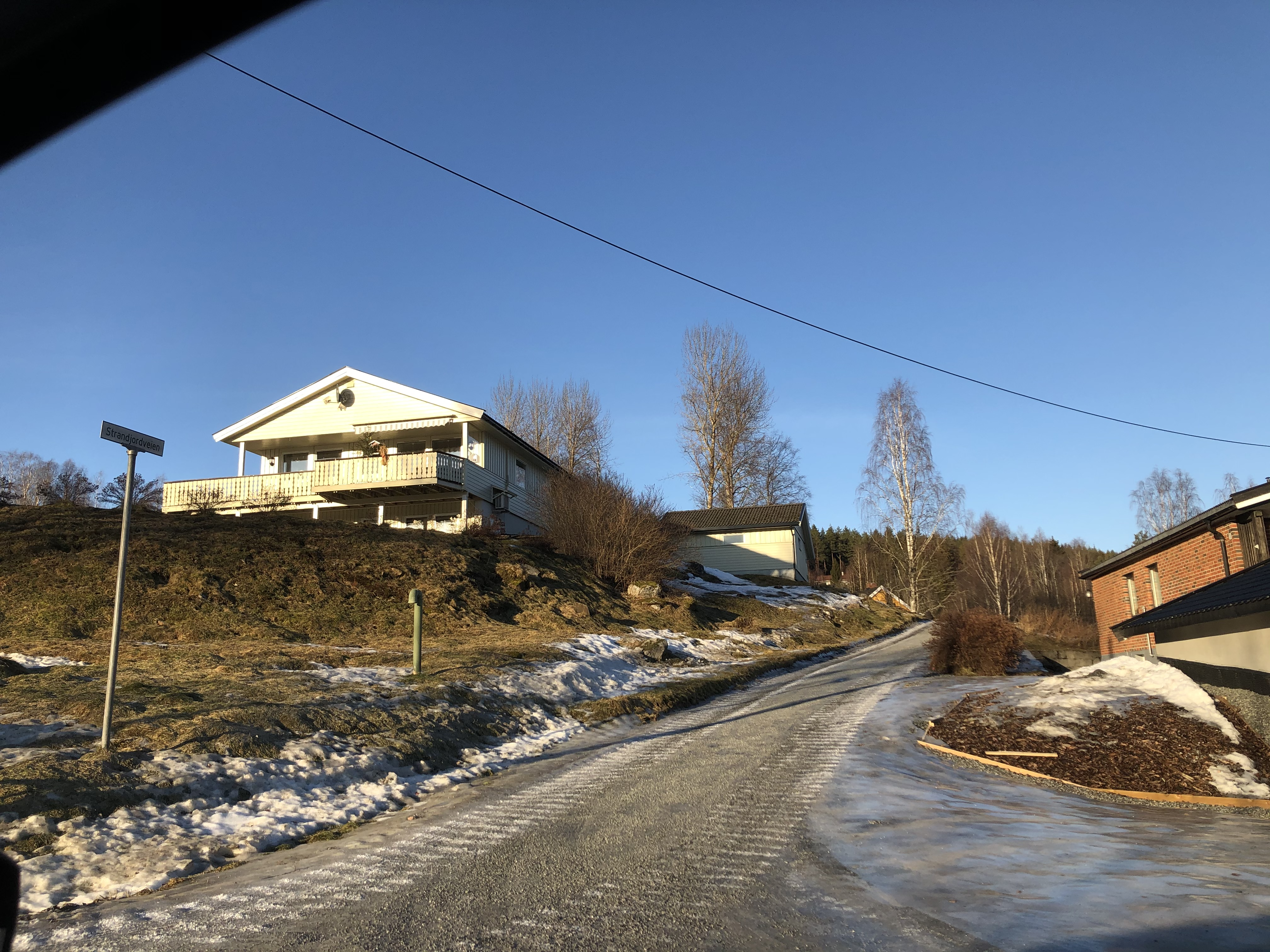 Strandjordveien, Veme, Ringerike